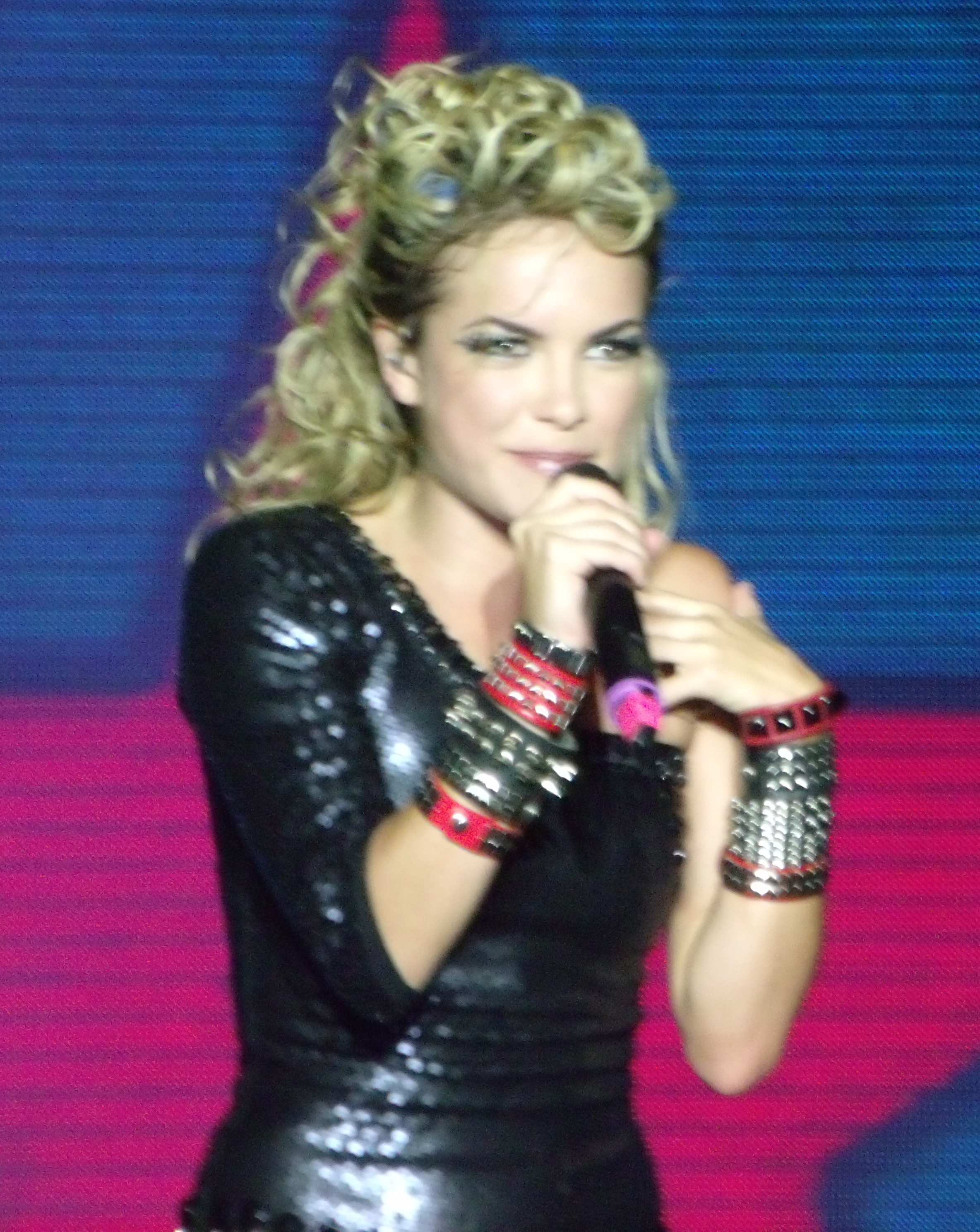 Lua Blanco em um show em Porto Alegre